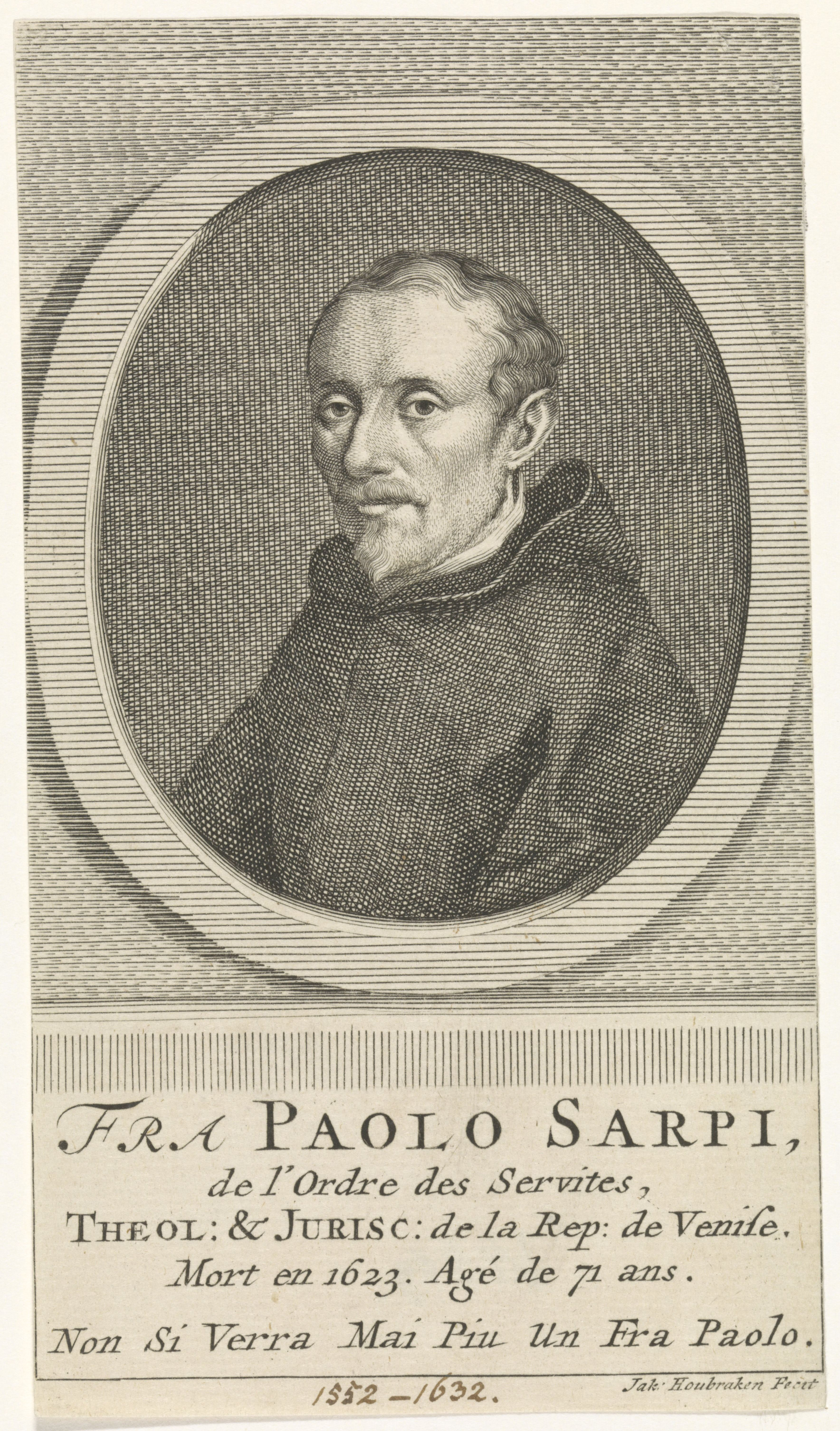 IdentificatieTitel(s): Portret van Paolo SarpiFra Paolo Sarpi (titel op object)Objecttype: prent Objectnummer: RP-P-1909-4493Catalogusreferentie: Ver Huell 369Opschriften / Merken: verzamelaarsmerk, verso, gestempeld: Lugt 2228datum, recto midden onder, handgeschreven: ‘1552-1632’Omschrijving: Buste naar links van Paolo Sarpi in een ovaal. Onder het portret zijn naam ene gegevens in vier regels in het Frans en daaronder een regel in het Italiaans.VervaardigingVervaardiger: prentmaker: Jacob Houbraken (vermeld op object)Plaats vervaardiging: AmsterdamDatering: 1708 - 1780Fysieke kenmerken: gravure en pen in bruinMateriaal: papier Techniek: graveren (drukprocedé) / penAfmetingen: blad: h 155 mm × b 87 mmOnderwerpWie: Paolo SarpiVerwerving en rechtenVerwerving: aankoop 1905Copyright: Publiek domein